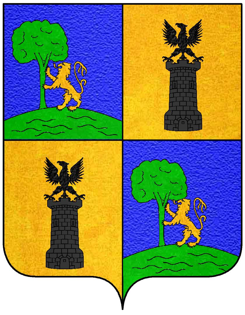 Stemma della famiglia Abbatucci